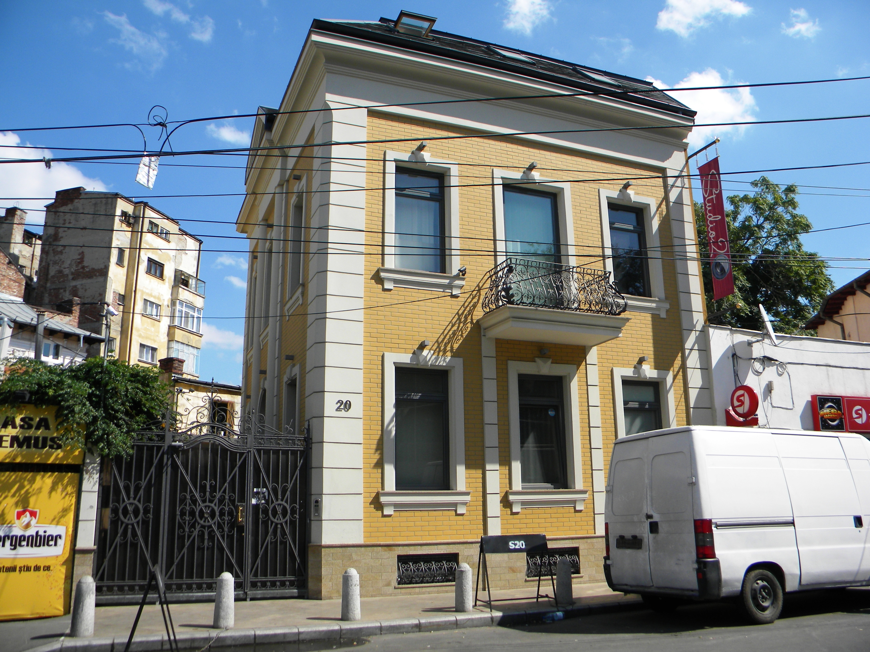 Bucuresti, Romania, Str. Atelierului nr. 20, sect. 1 (1); B-II-m-B-18011